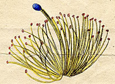 Ausschnitt (Klasse XIII) aus Ehrets Tafel "Methodus Plantarum Sexualis"